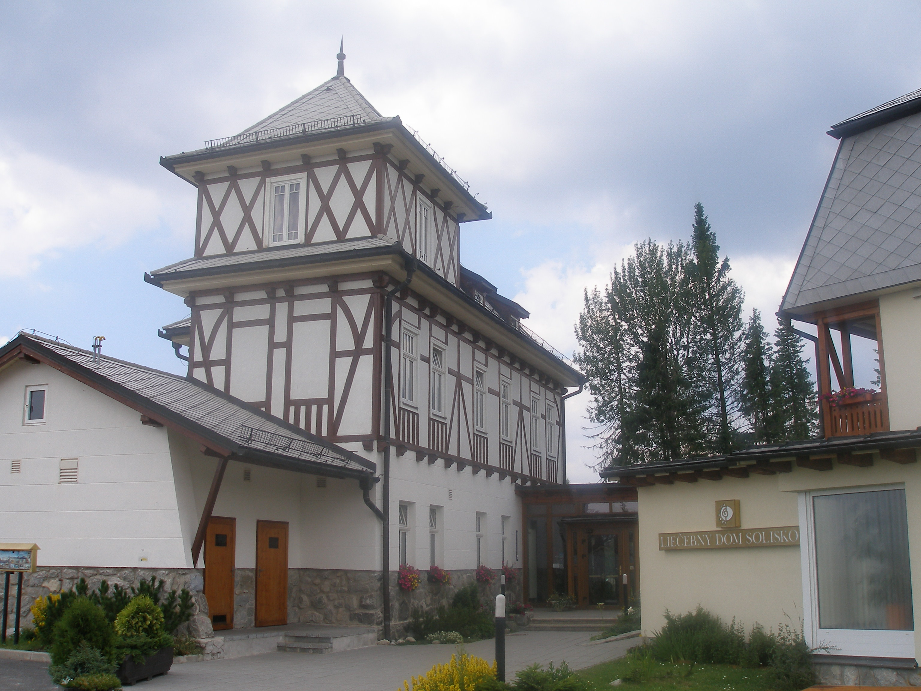 Tatranská osada Štrbské Pleso